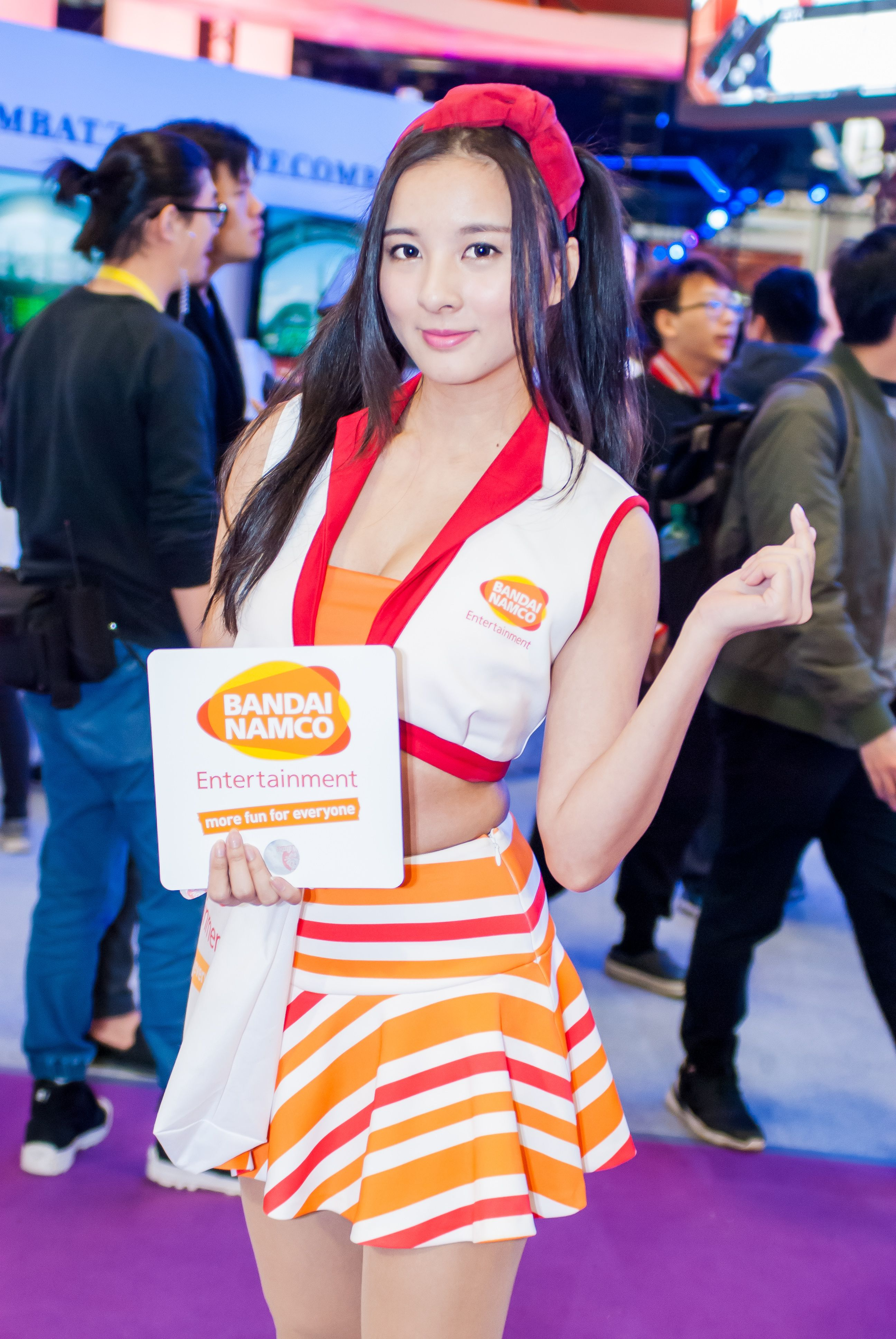 2017臺北國際電玩展，台灣萬代南夢宮娛樂攤位宣傳模特兒。